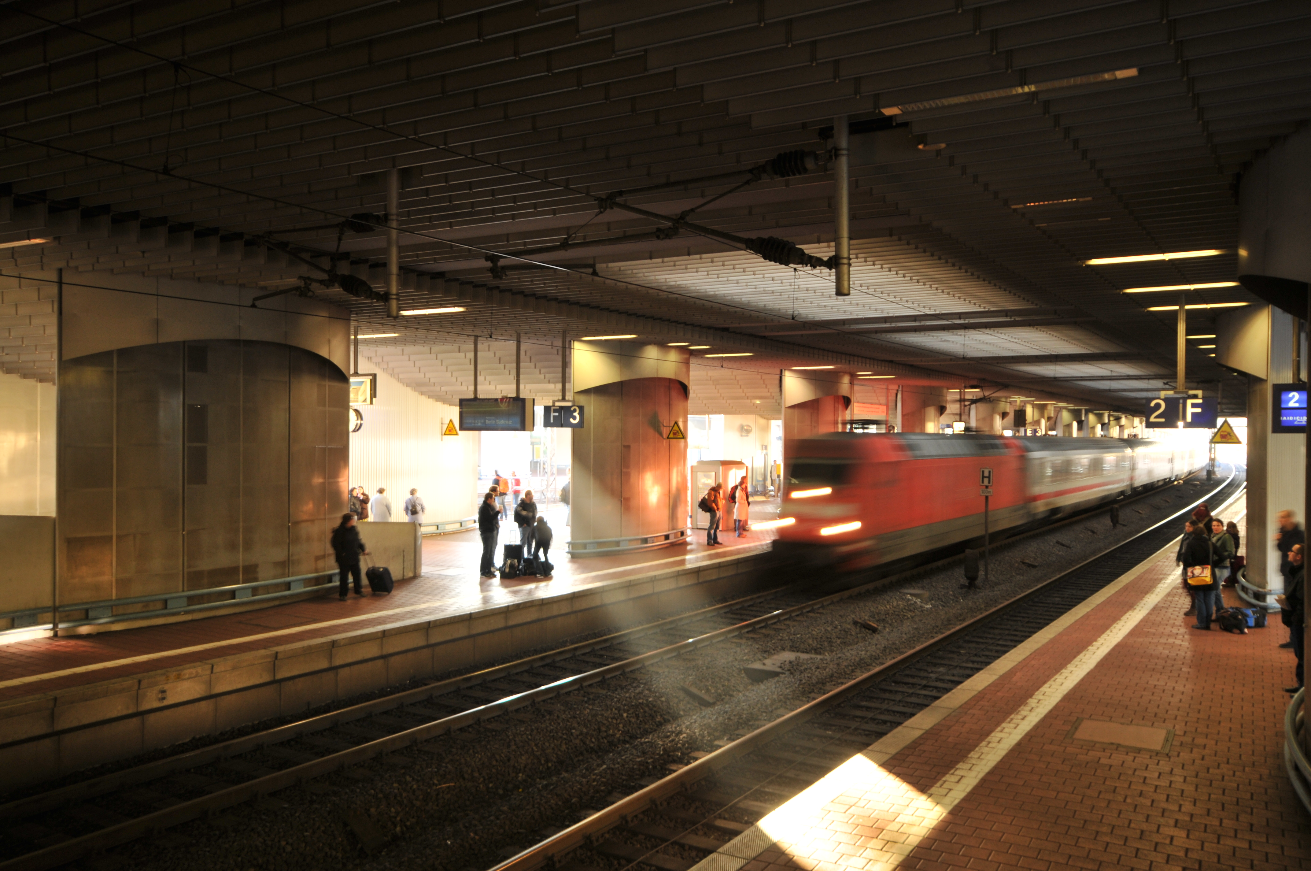 Kassel Bahnhof Wilhelmshöhe